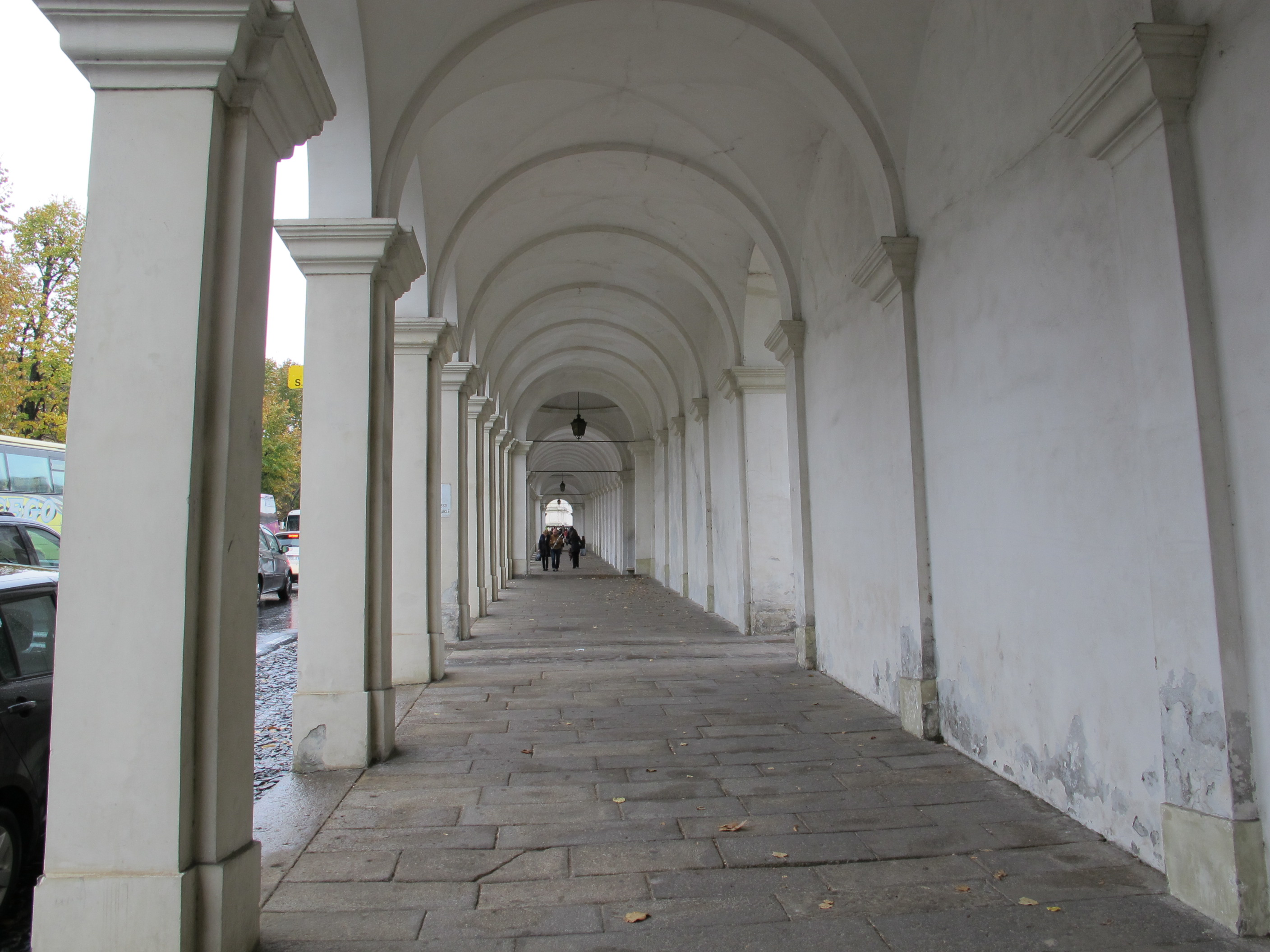 Salita al monte berico